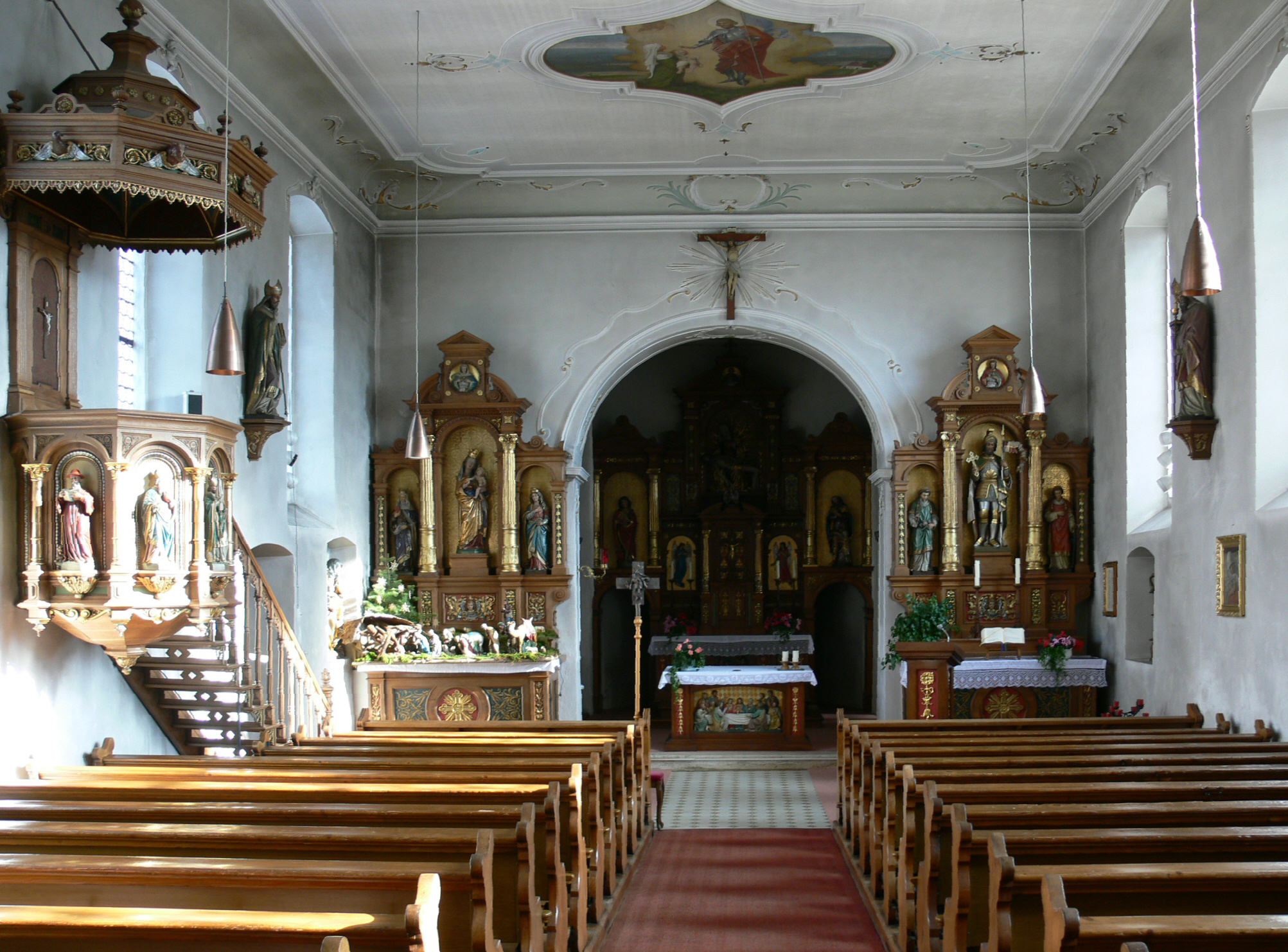 Wolpertswende (Baden-Württemberg), Pfarrkirche St. Gangolf, Blick in die Kirche Altäre von Moriz Schlachter (1852–1931) DescriptionGerman sculptorDate of birth/death18 March 185213 August 1931Location of birth/deathRavensburgRavensburgWork locationRavensburgAuthority control : Q1948196 VIAF: 80927094 GND: 136612679